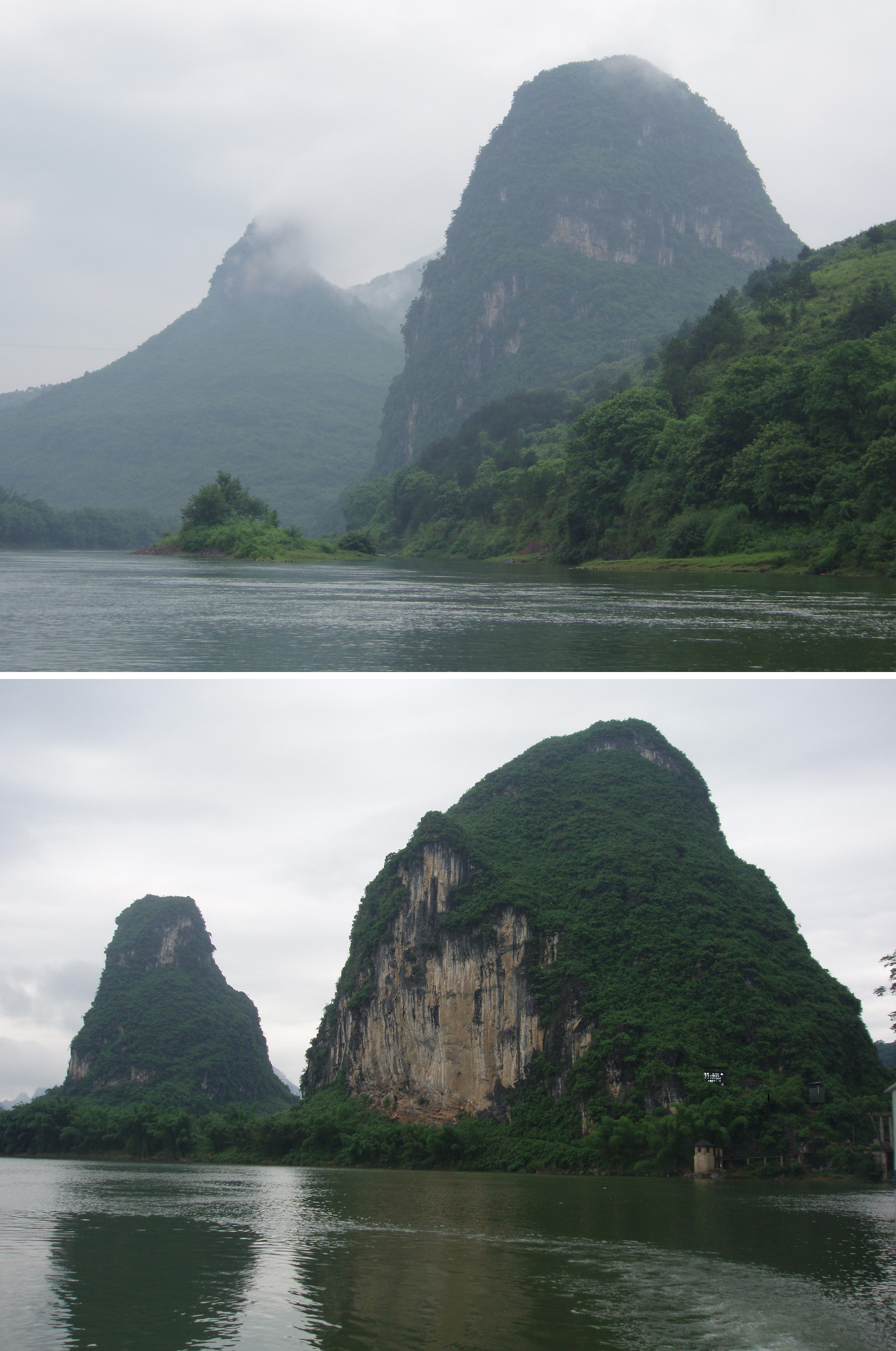 有霧與無霧天氣下的灕江山水